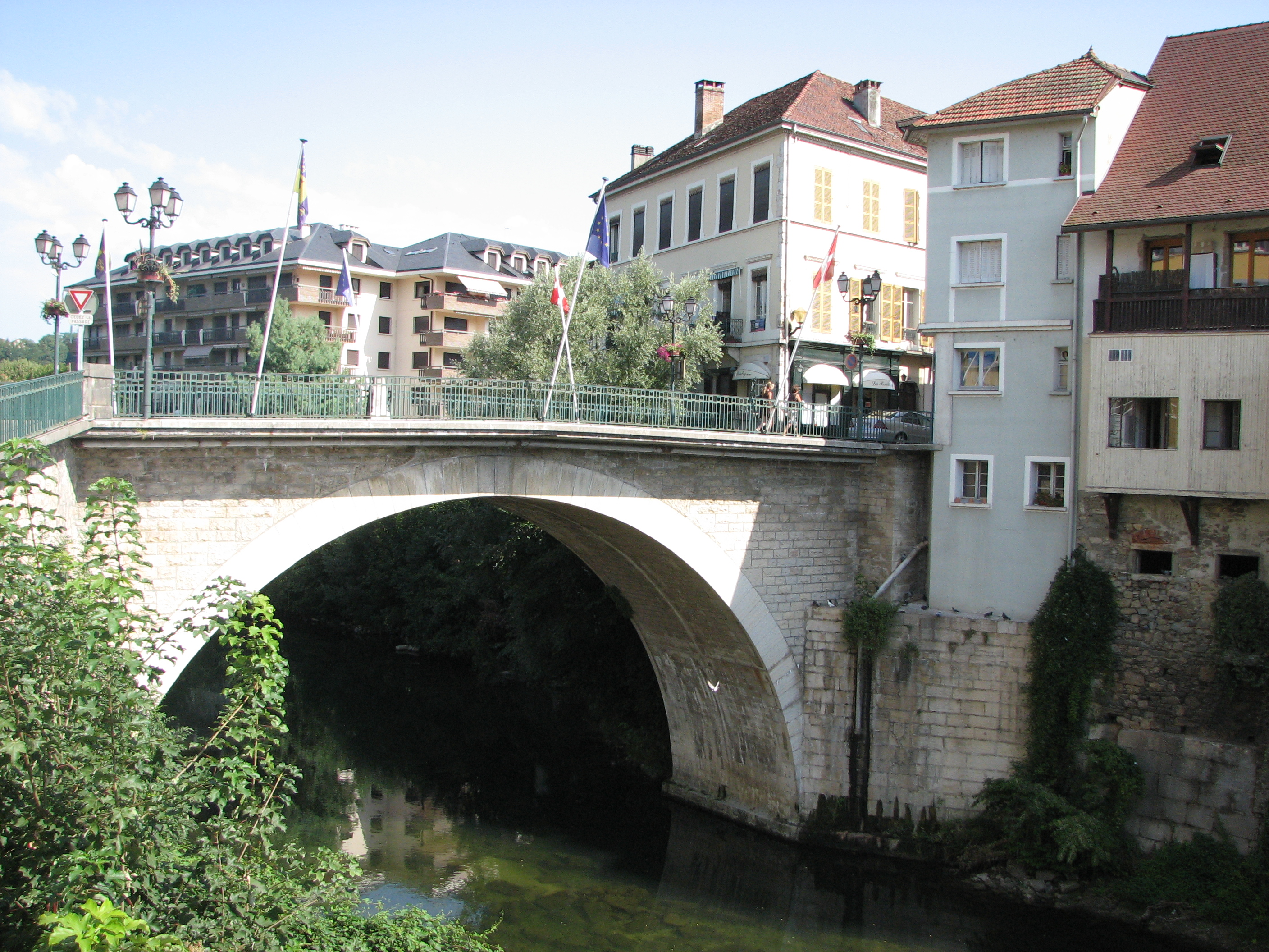 Pont François Ier, à Pont-de-Beauvoisin (vu de l'Isère)